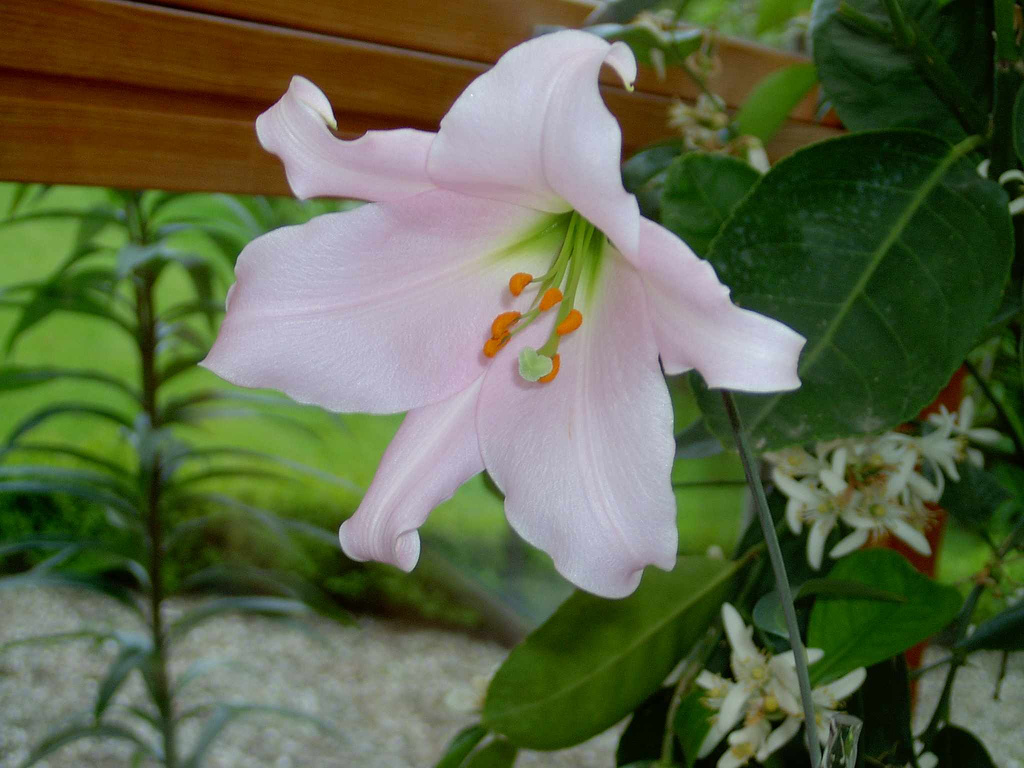 Lilium japonicum